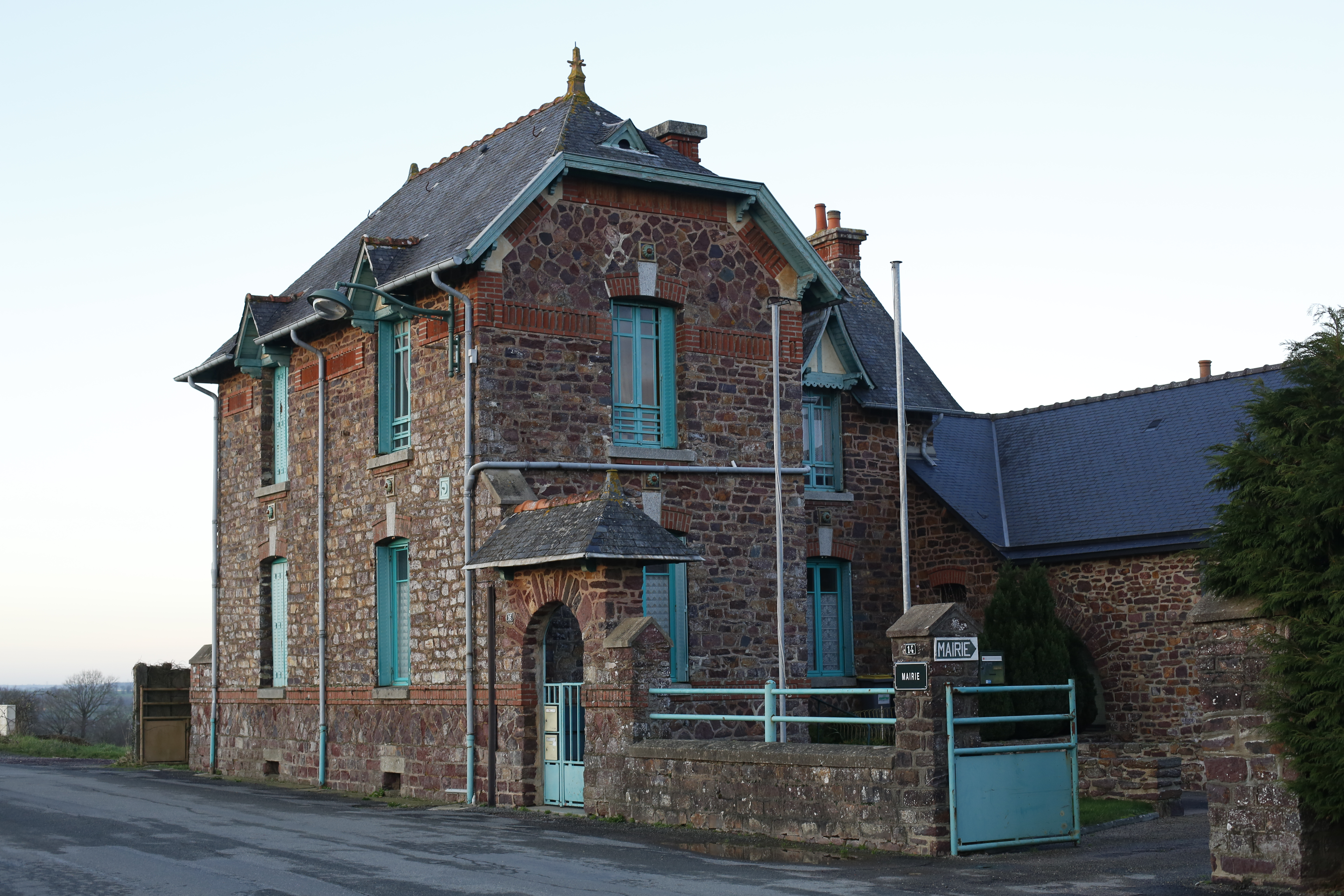 Mairie de Saint-Malon-sur-Mel.